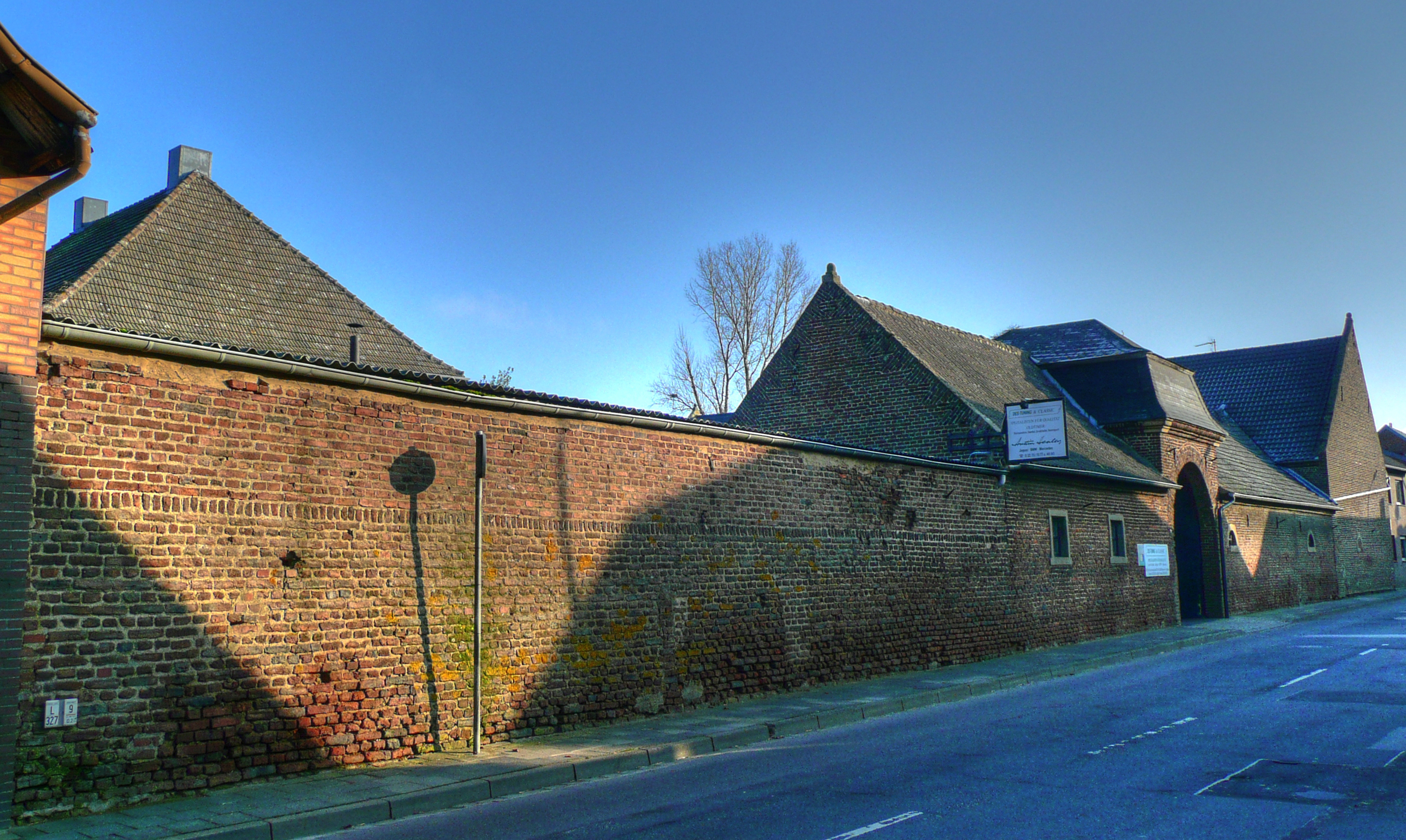 Die Außenmauer der Stacherburg in der Buirer Straße; HDR-Foto aus drei digitalen Fotografien